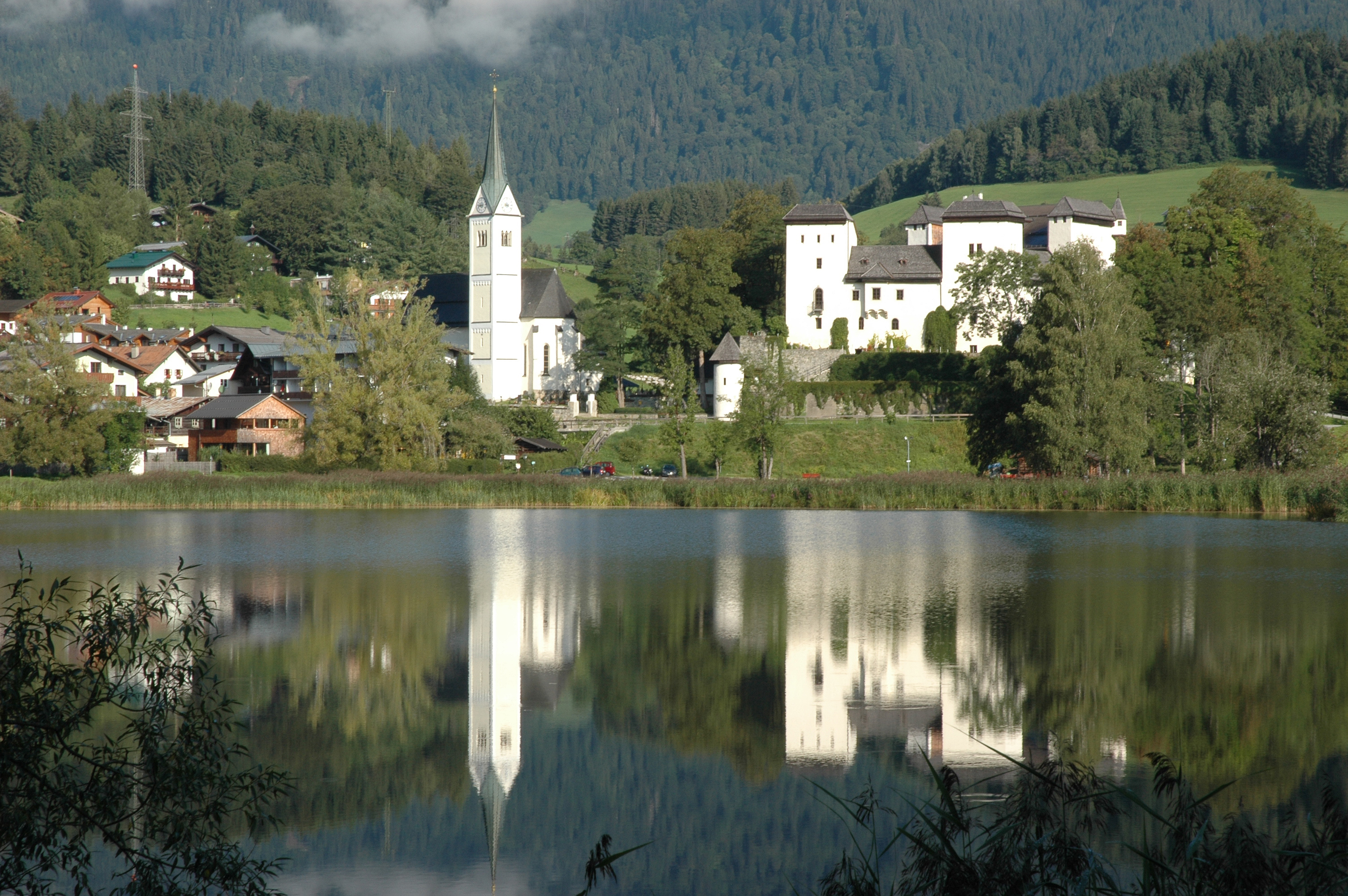 Ansicht von Goldegg über den Goldegger See. Pfarrkirche und rechts Schloss Goldegg.